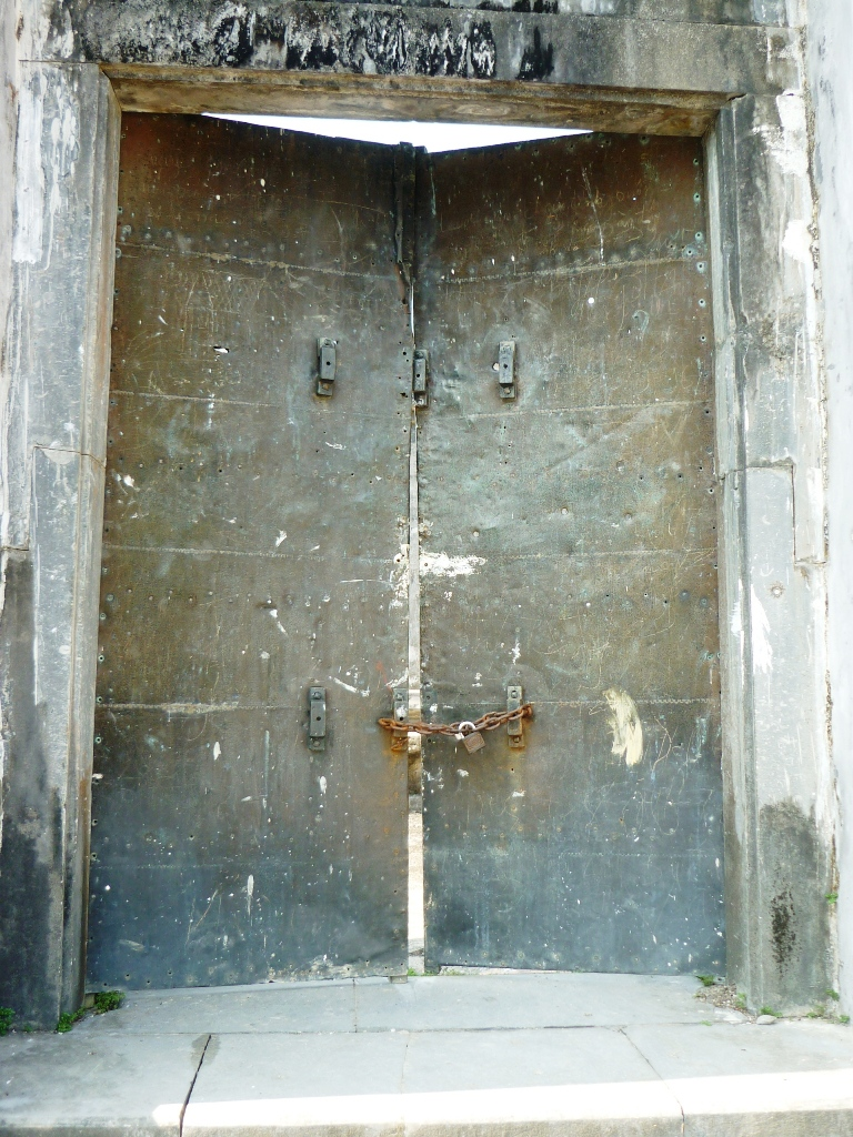 Thể Loại:Lăng tẩm Huế Thể Loại:Di tích cố đô Huế Thể loại:Lăng tẩm các Vua chúa Nguyễn Thể loại:Di tích ngoài Kinh Thành Huế